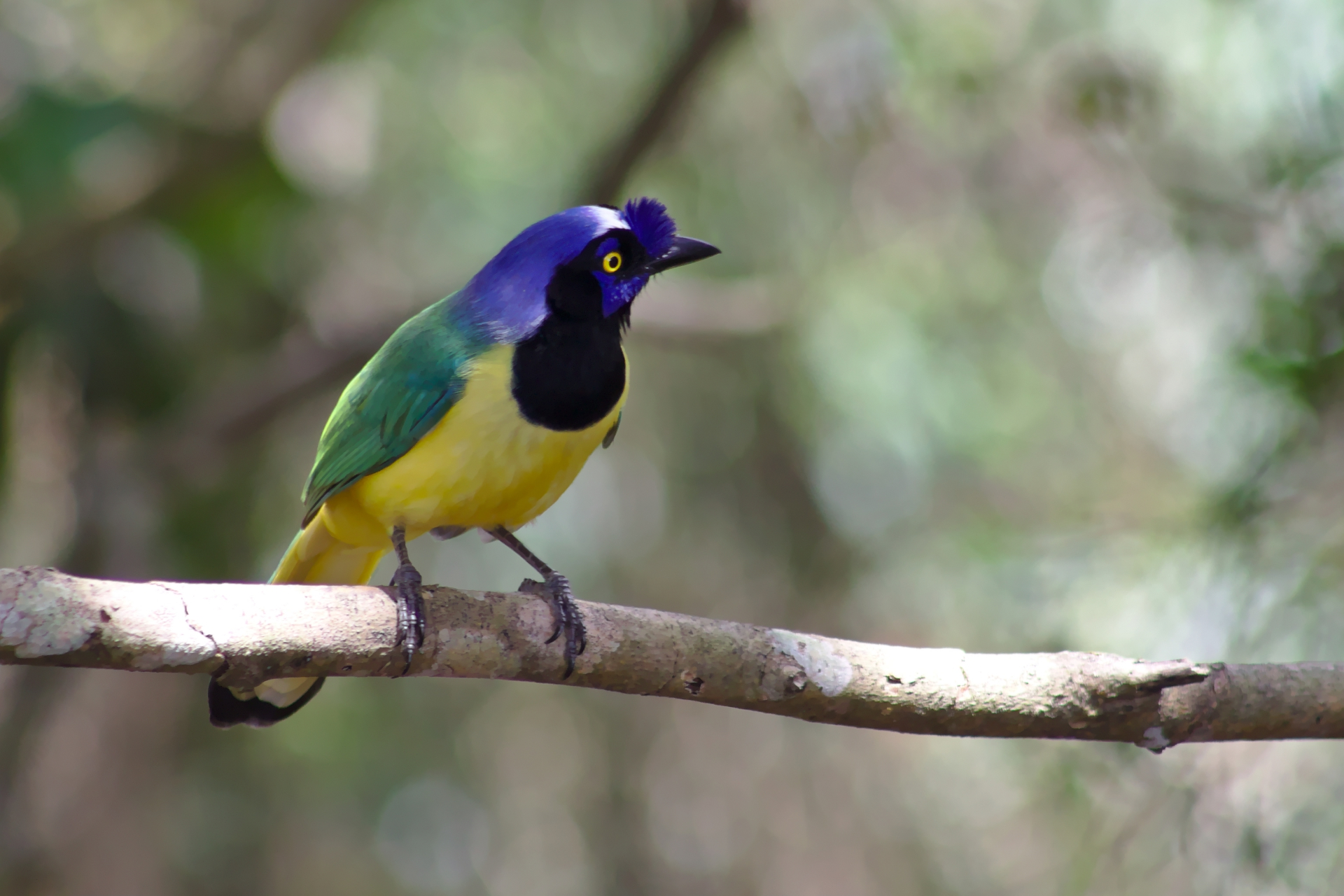 Inca Jay | Querrequerre (Cyanocorax yncas)